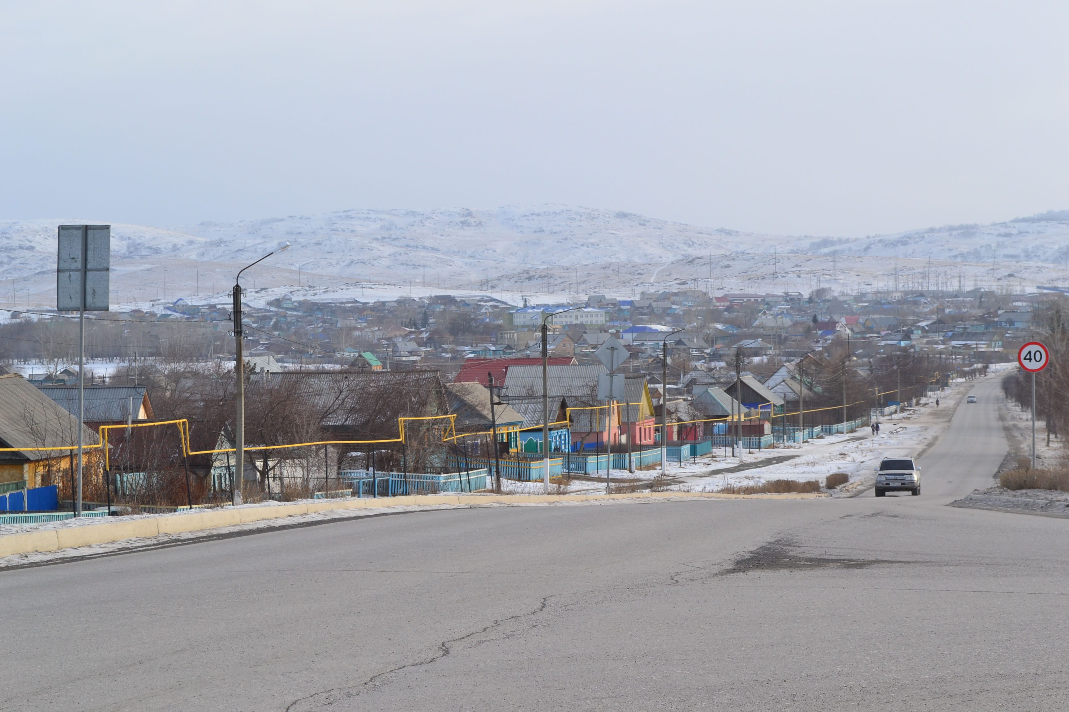 Баймак